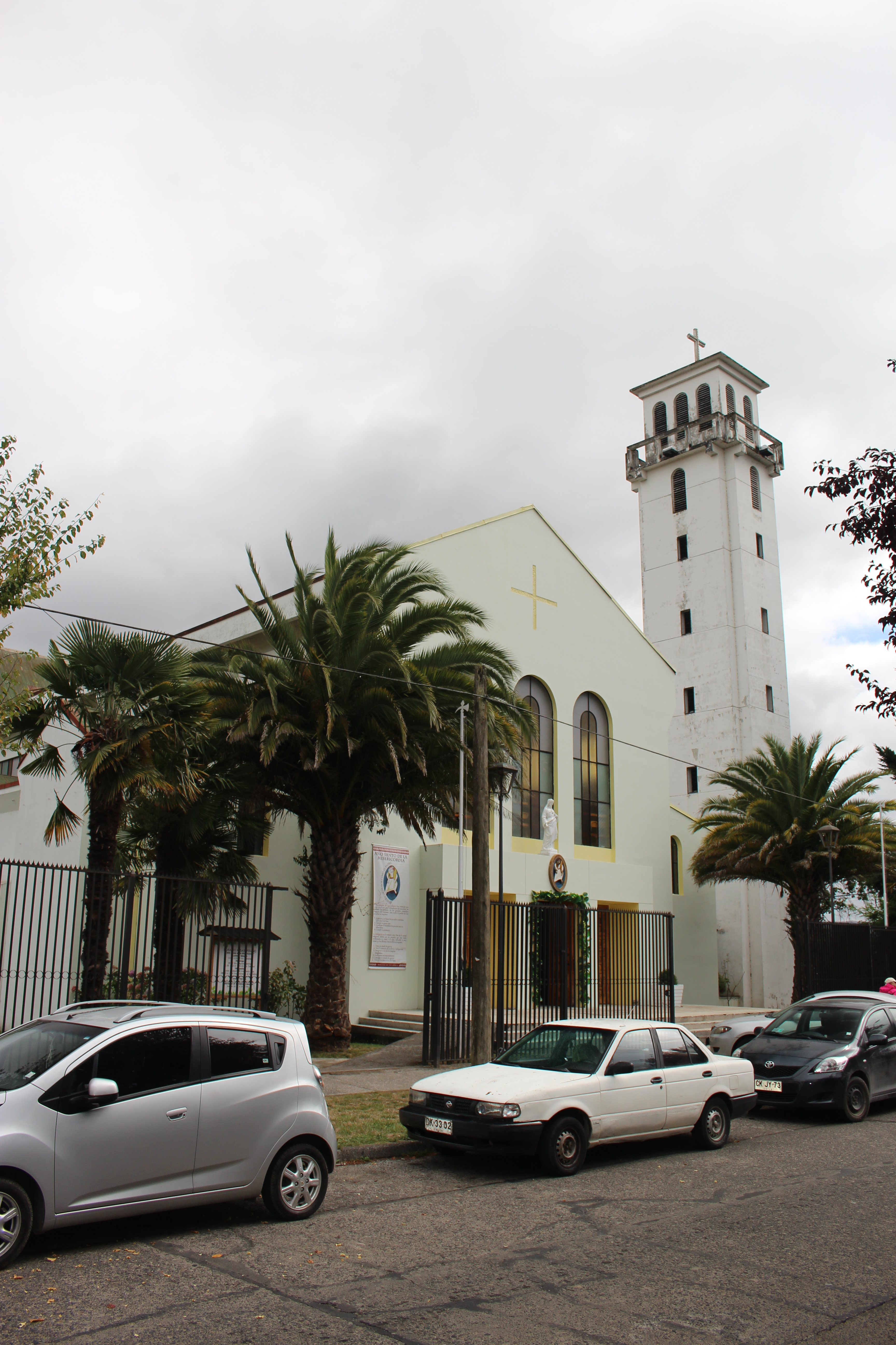 Frontis Catedral de Villarrica, ubicada en comuna homónima, Chile